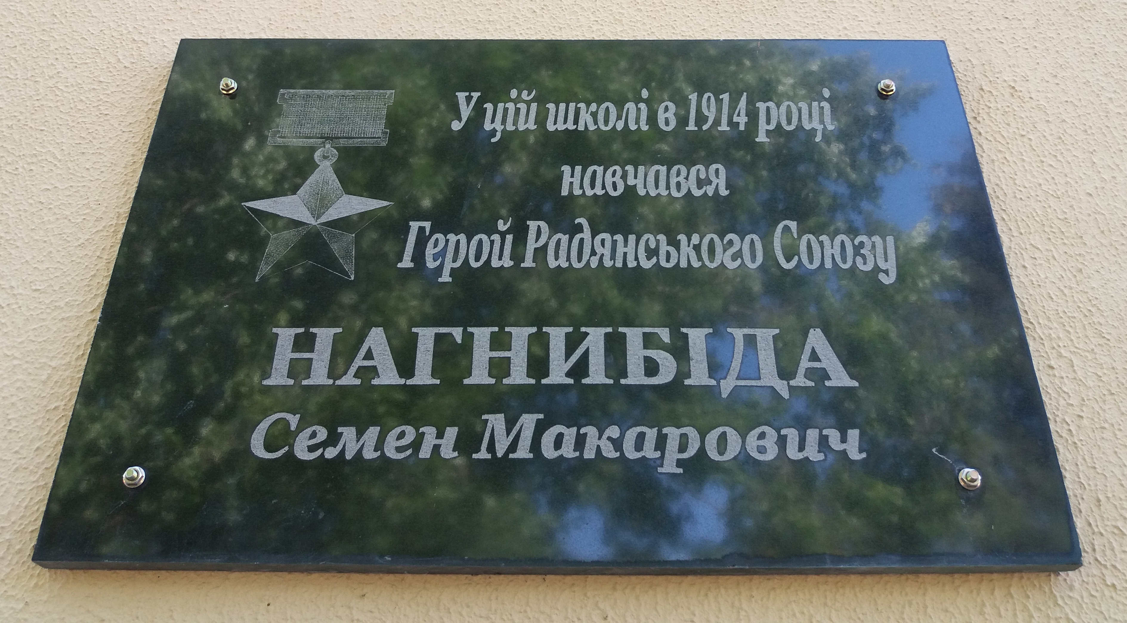 Меморіальна дошка на будинку школи, в якій навчався Герой Радянського Союзу С.М.Нагнибіда, с. Солониця